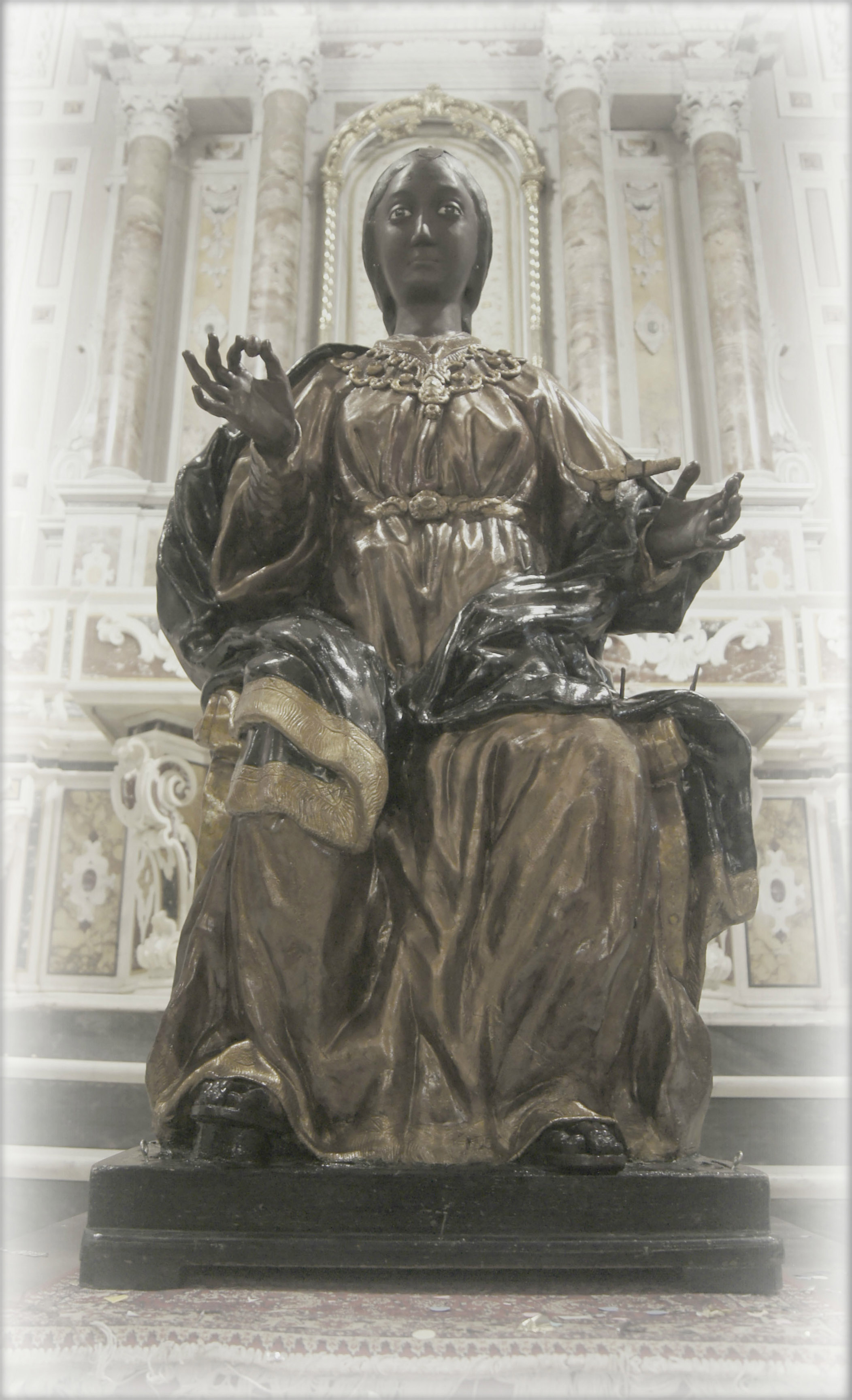 Statua della Madonna del Soccorso senza ulteriori abiti ed accessori. Autore ed opera di Giuseppe Palumbo scattata in data 06 giugno 2012 nel Santuario di San Severo